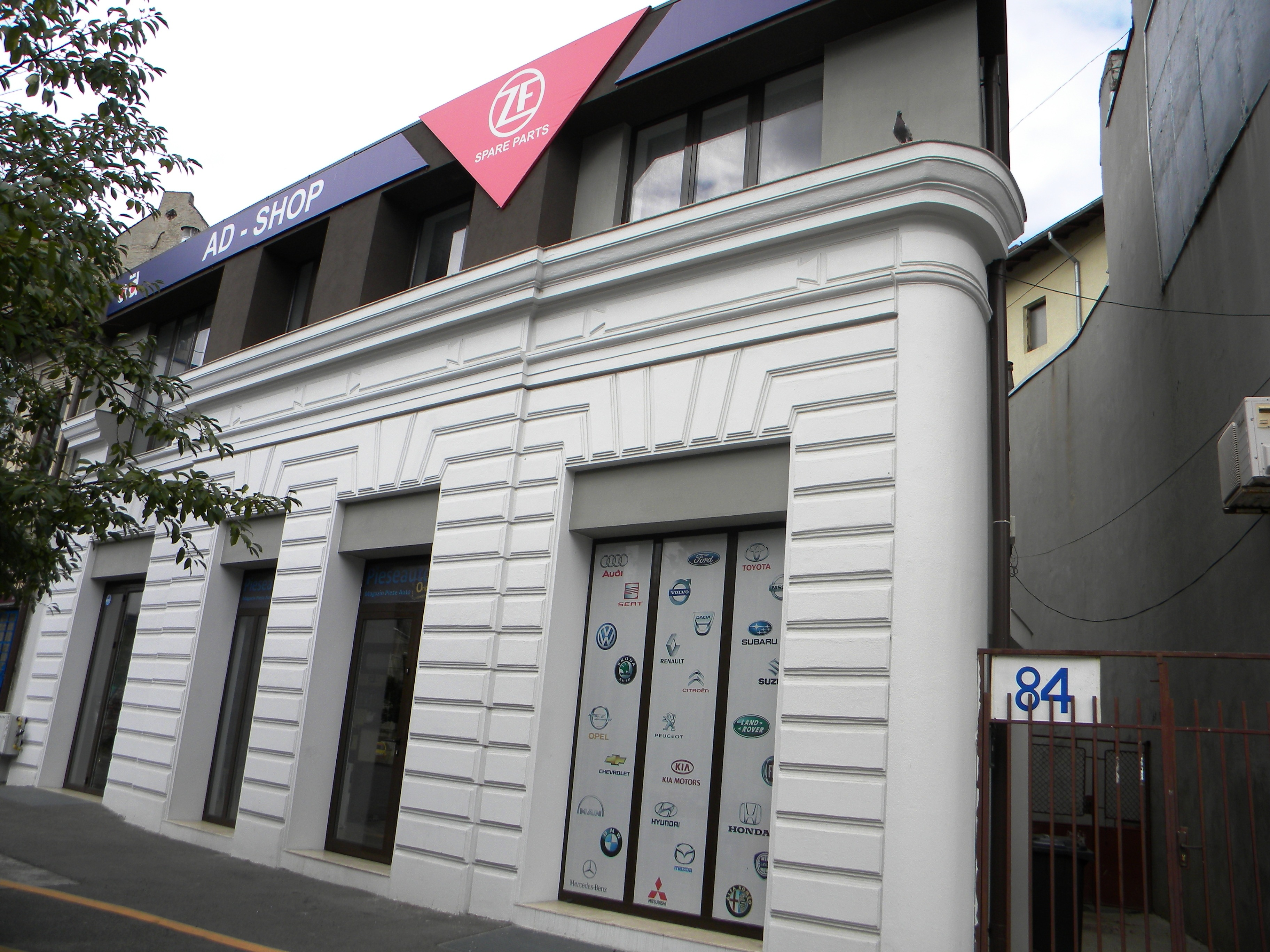 Bucuresti, Romania, Casa pe Calea Plevnei nr. 84, sect. 1